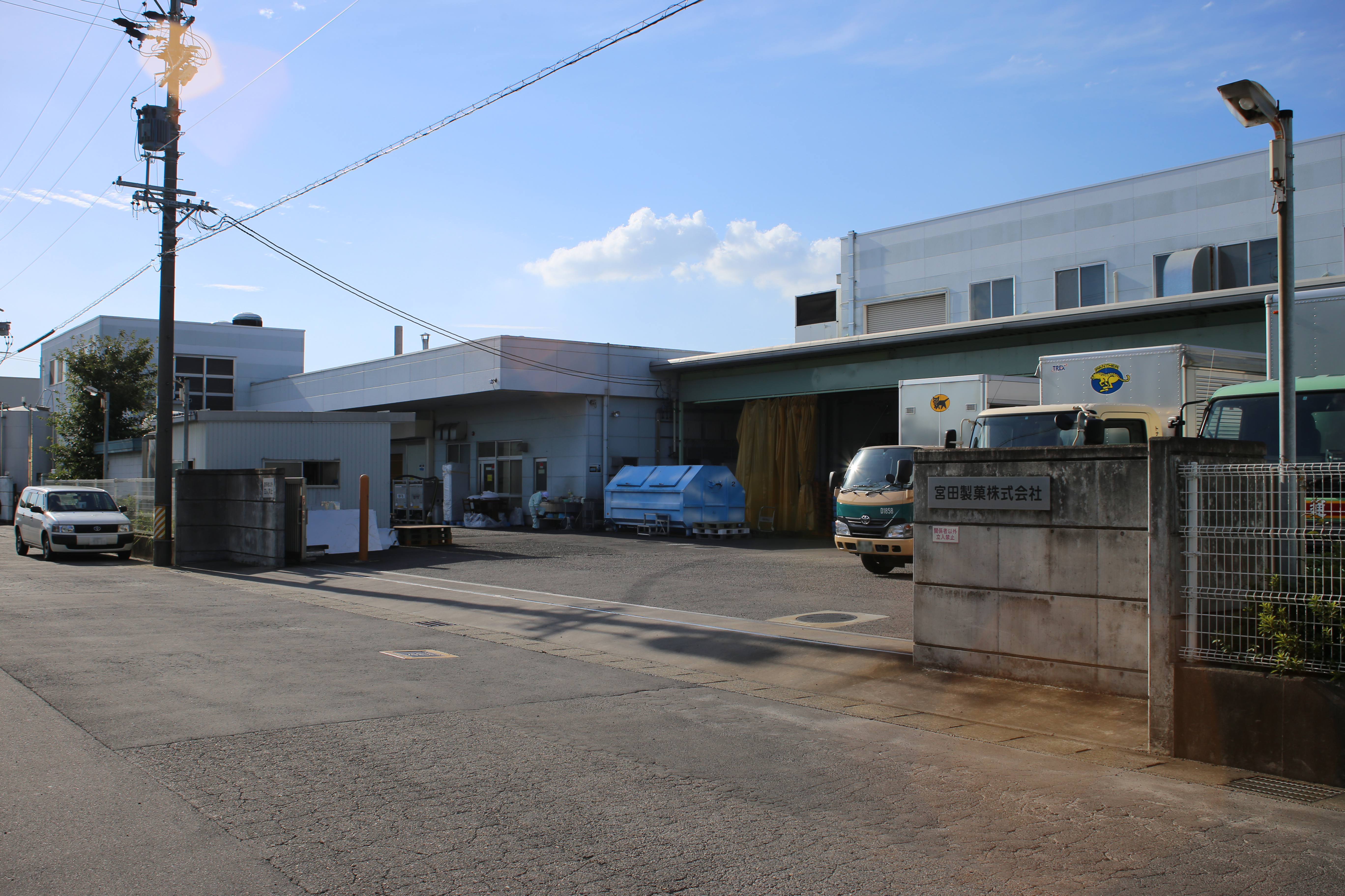 岐阜県各務原市鵜沼各務原町の宮田製菓本社を南側公道東側より撮影。ただし、ナンバープレートにつき画像処理済。